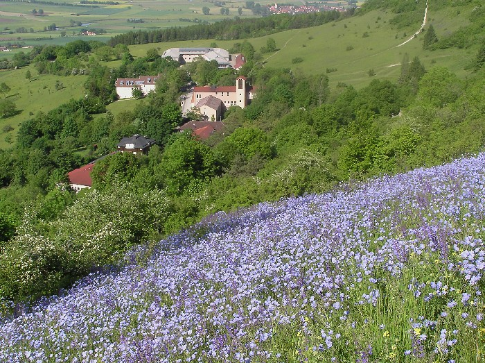 Blick über Flachs auf die Volkshochschule Hesselberg Fotograf: Oswald Engelhardt